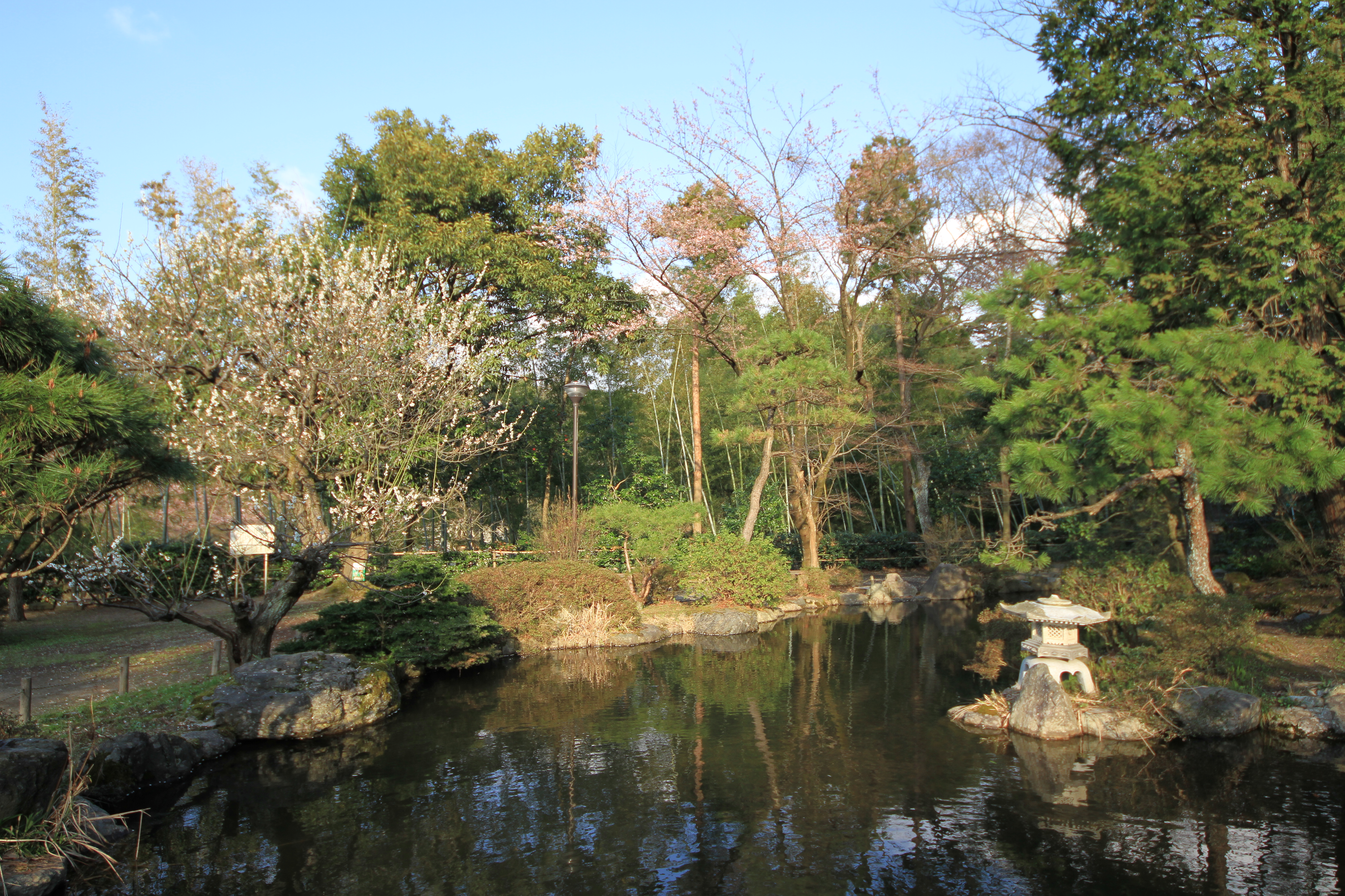 3 Chome-8 Akiha, Akiha-ku, Niigata-shi, Niigata-ken 956-0832, Japan 秋葉公園内日本庭園